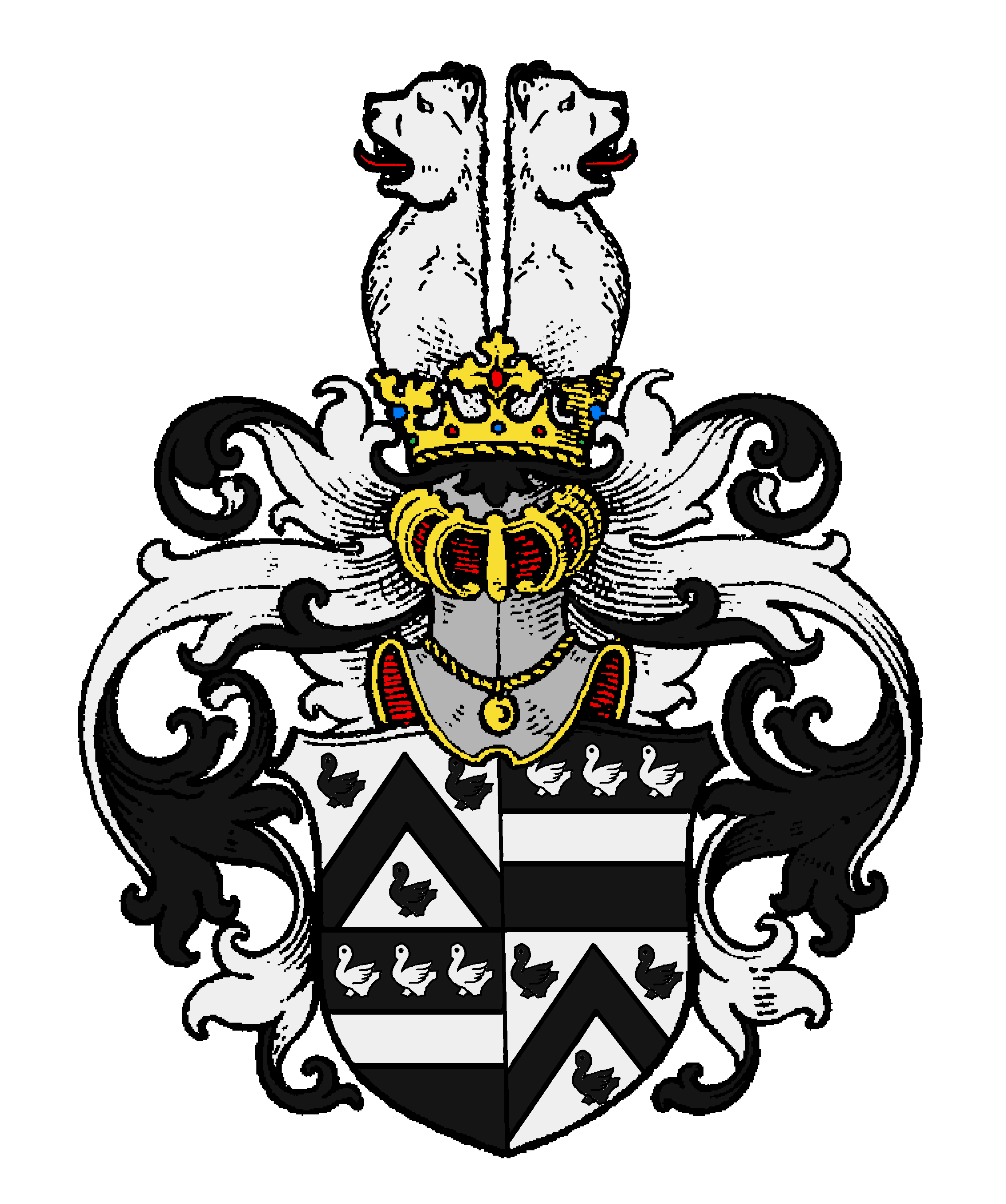 Stammwappen (Variante) der von Hoverbeck, einem aus Brabant stammenden Adelsgeschlecht.